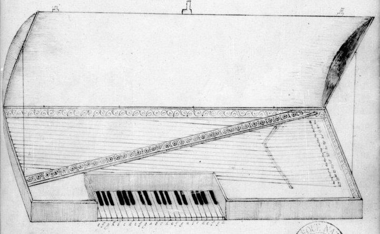 Dessin d'une épinette par Jacques Cellier (? - vers 1620)